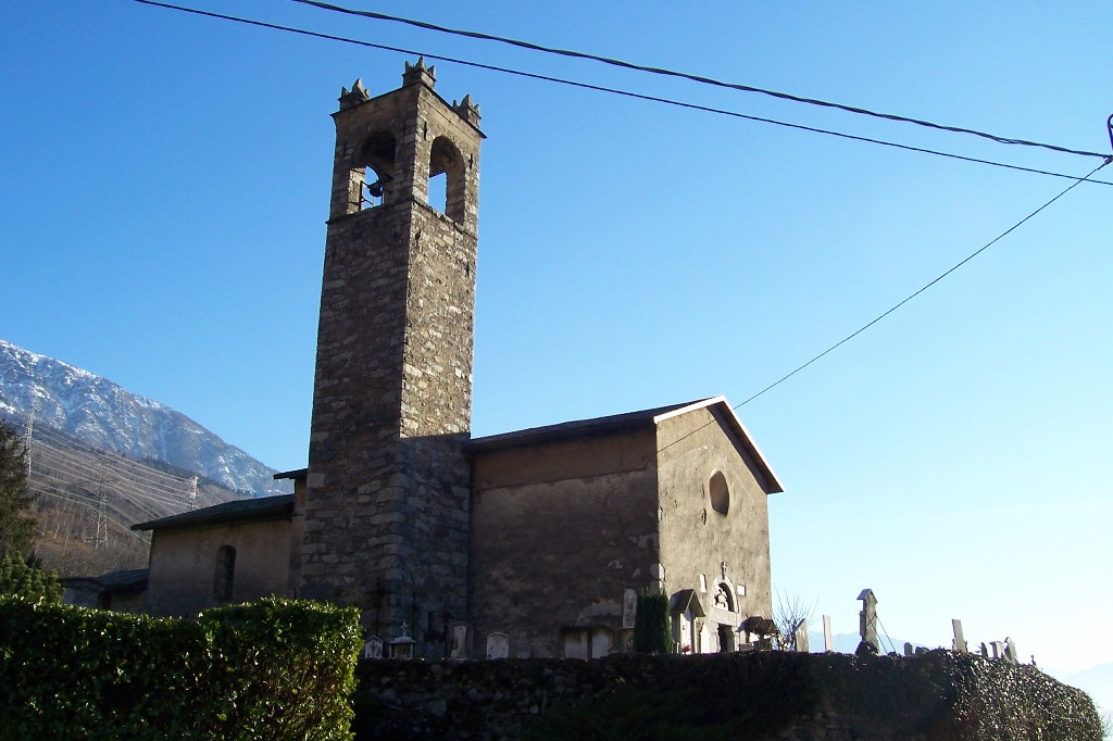 Chiesa di San Nazaro e Celso. Andrista, Cevo , Val Camonica, Italia